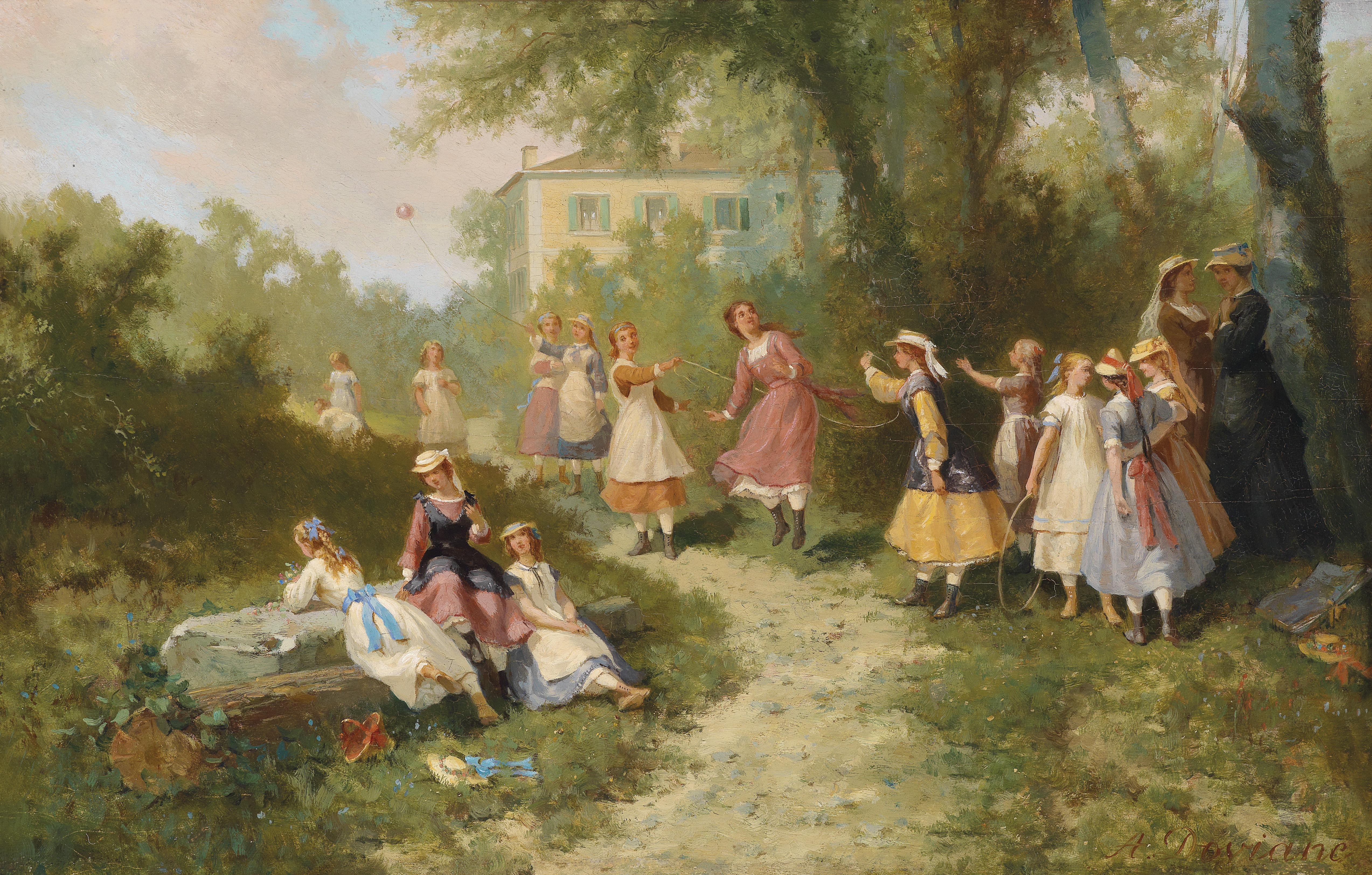 Spielende Kinder im Garten, signiert mit dem Pseudonym Doviane, Öl auf Holz, 27,5 x 42 cm